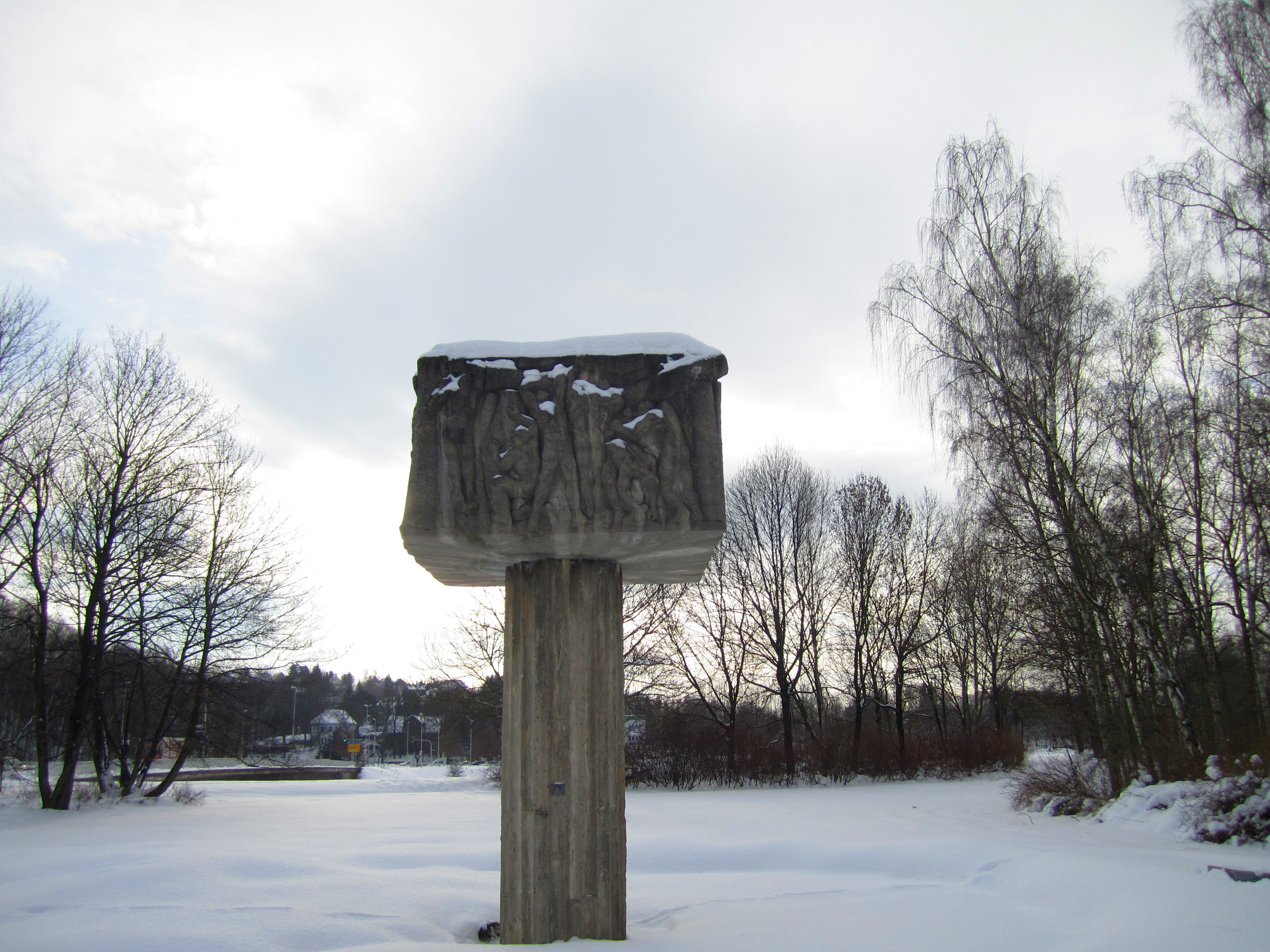 Bergbaulehrpfad Schedewitz–Oberhohndorf, Station 1, Bergbaudenkmal Schedewitzer Brücke. Zwickau, Sachsen, Deutschland.